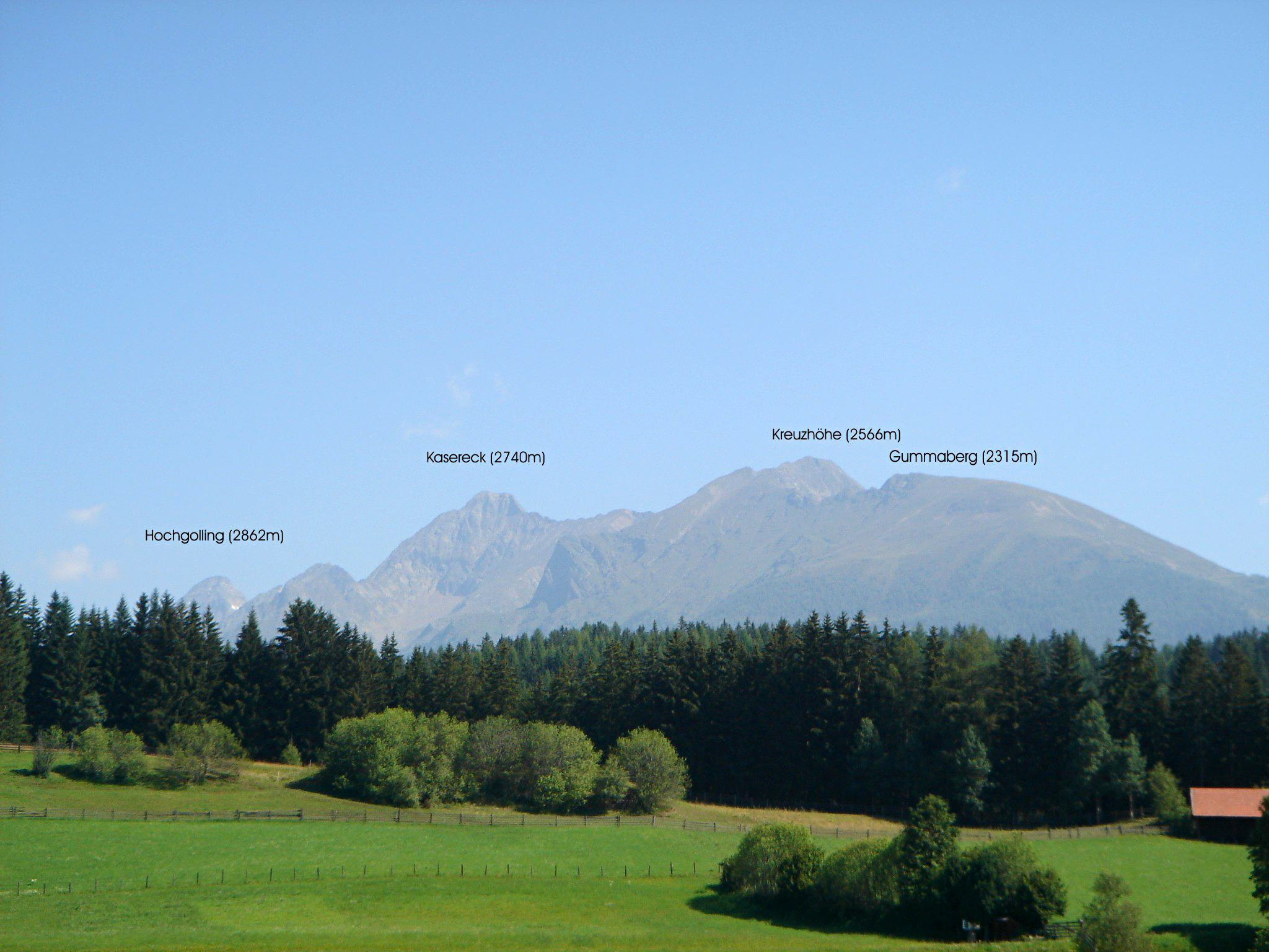 Kasereck Juli 2007